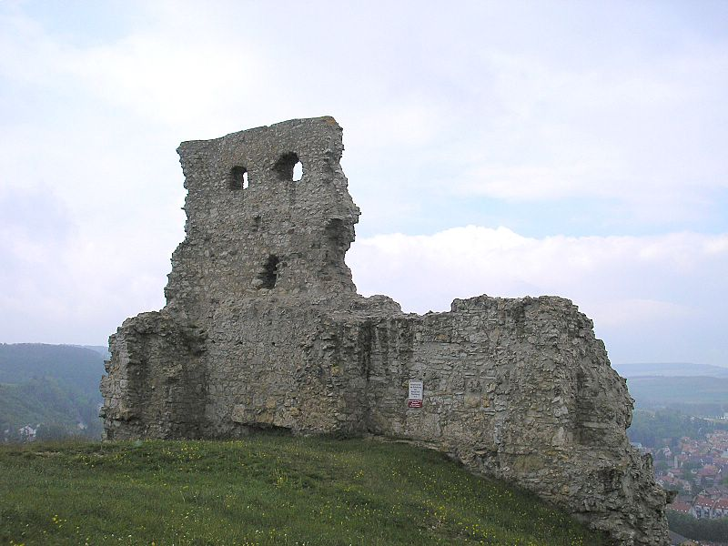 Burg Flochberg über Bopfingen (Ostalb). Das Wohngebäude im Nordosten.